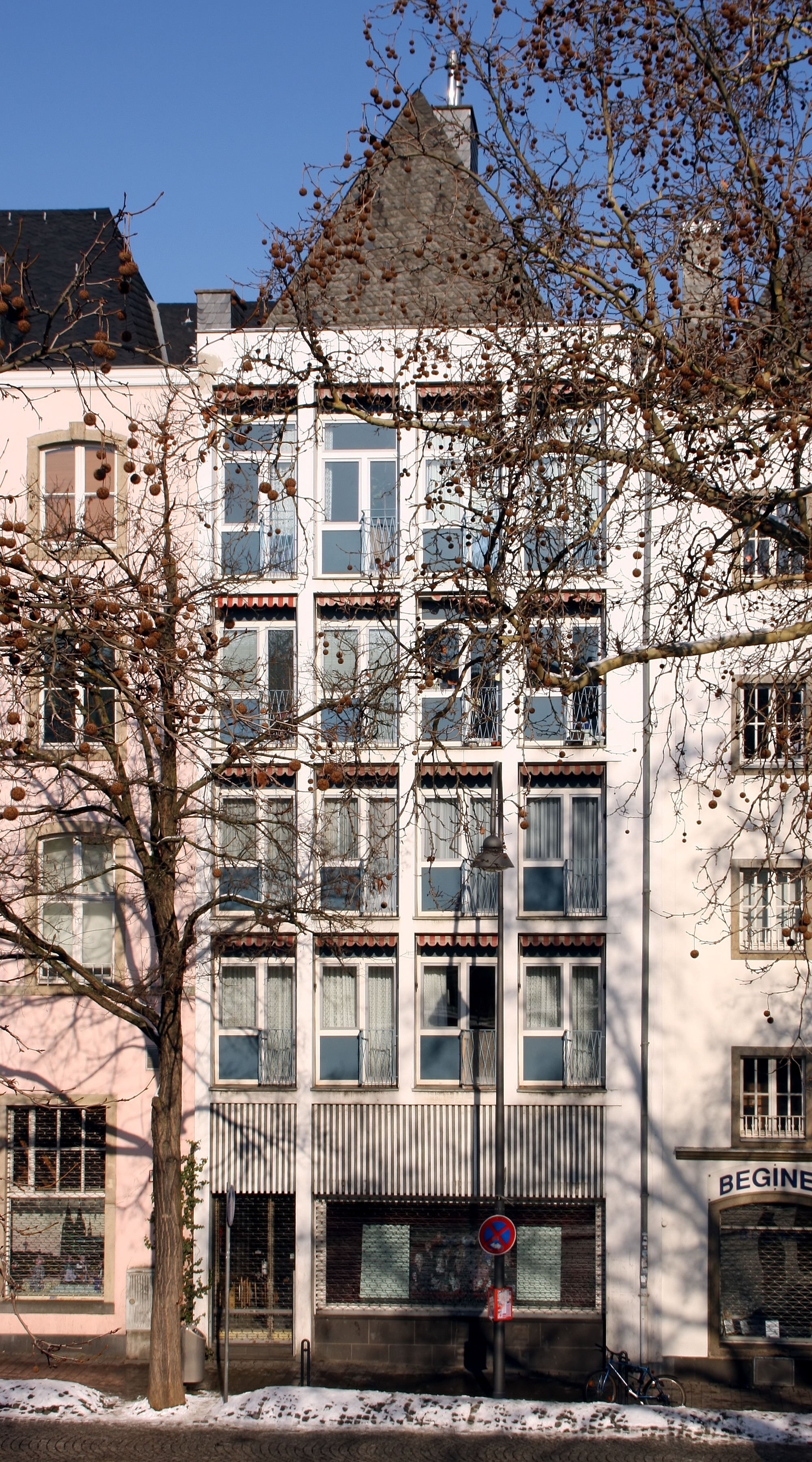 Wohn- und Geschäftshaus, Markmannsgasse 5, 50667 Köln. Architekt: Karl Band, Mitarbeiter: Hans Schilling